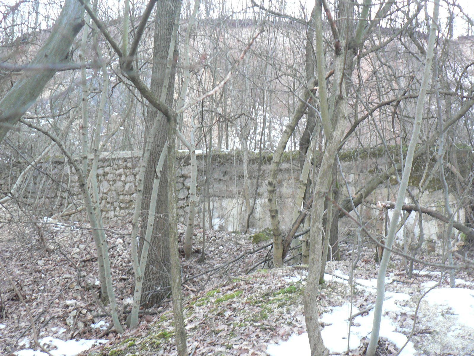 Épületrom a Hollandi-bányában.